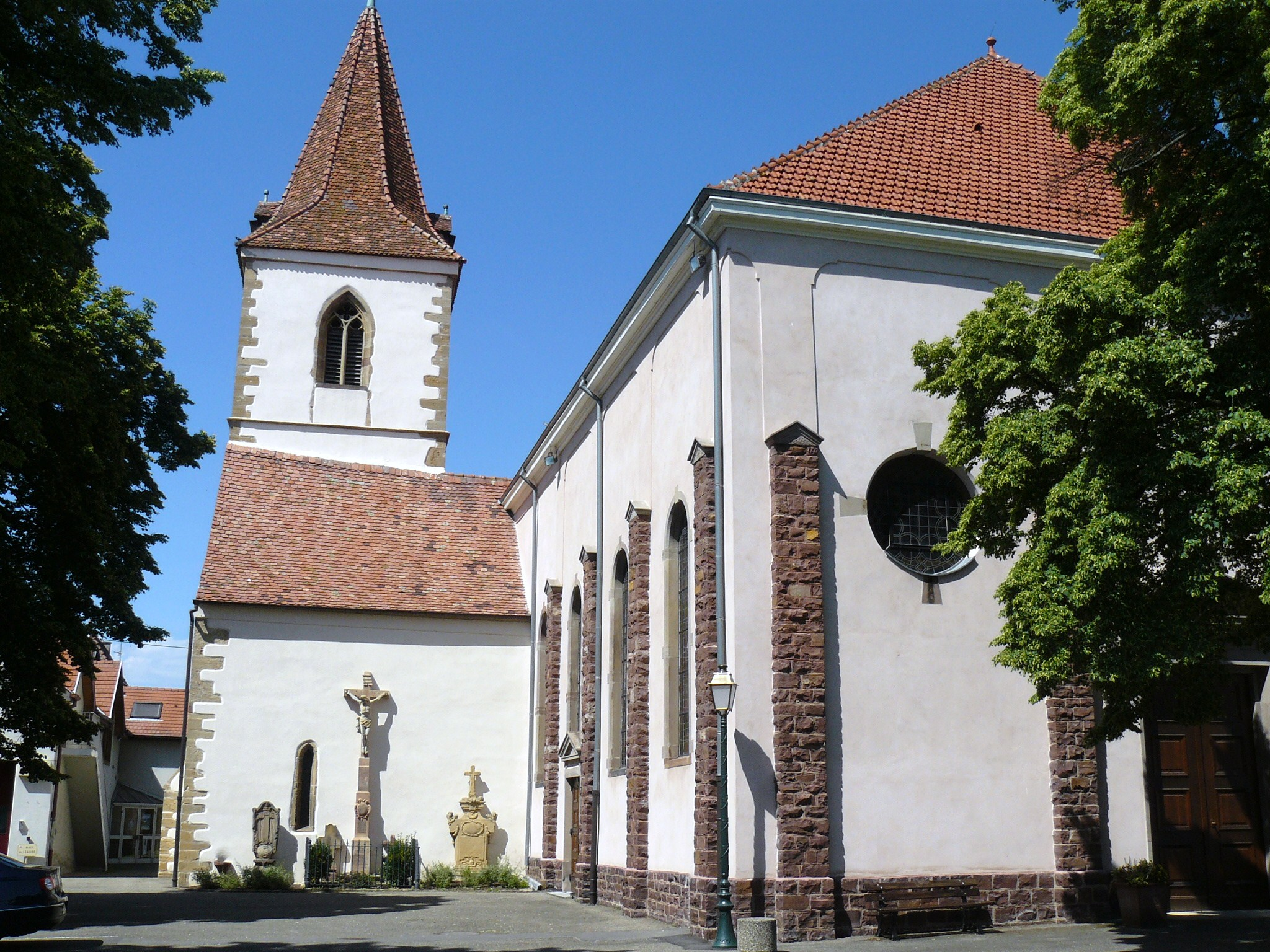 Église Saint-Michel